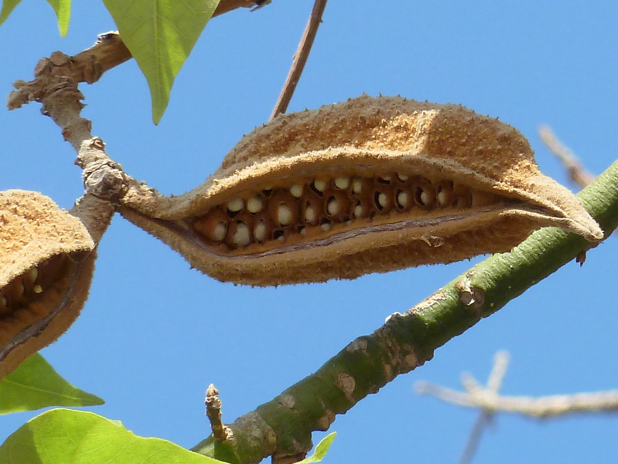 Brachychiton discolor : Fruto maduro abierto con semillas visibles - Paseo Marítimo, Águilas (Murcia, España).